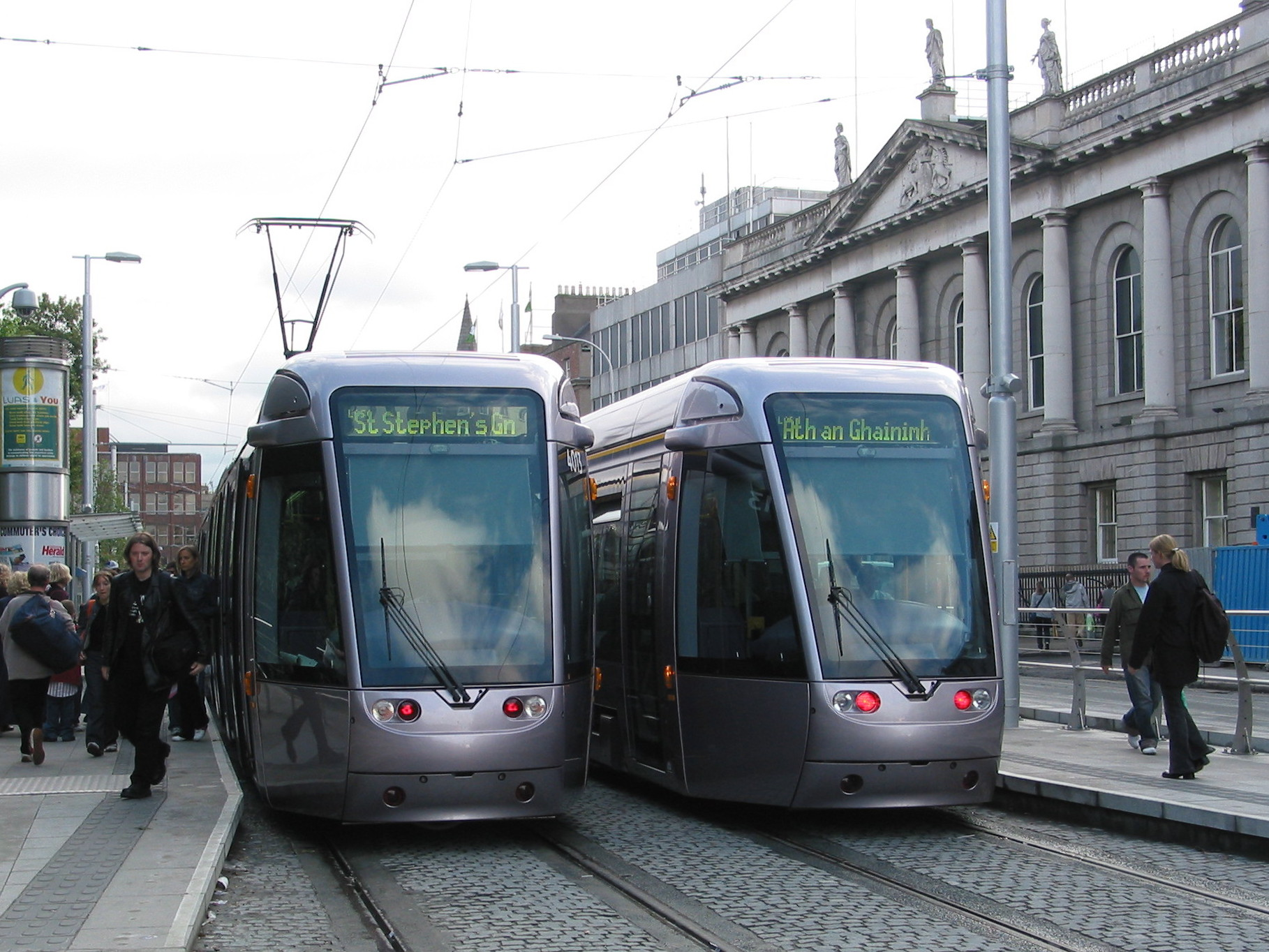 Luas (Typ Alstom Citadis 401) an der Endhaltestelle St Stephen’s Green station